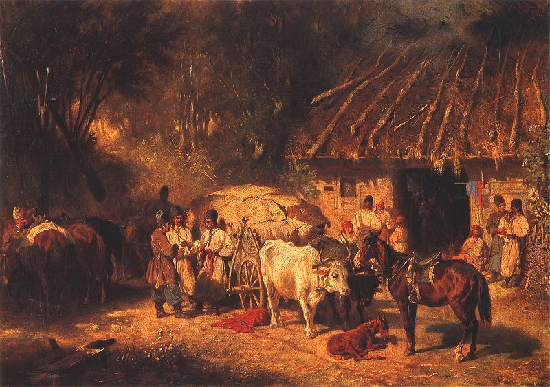 Popas czumaków przed karczmą. 1865. Olej na płótnie. 39 x 56 cm. Muzeum Okręgowe w Tarnowie.